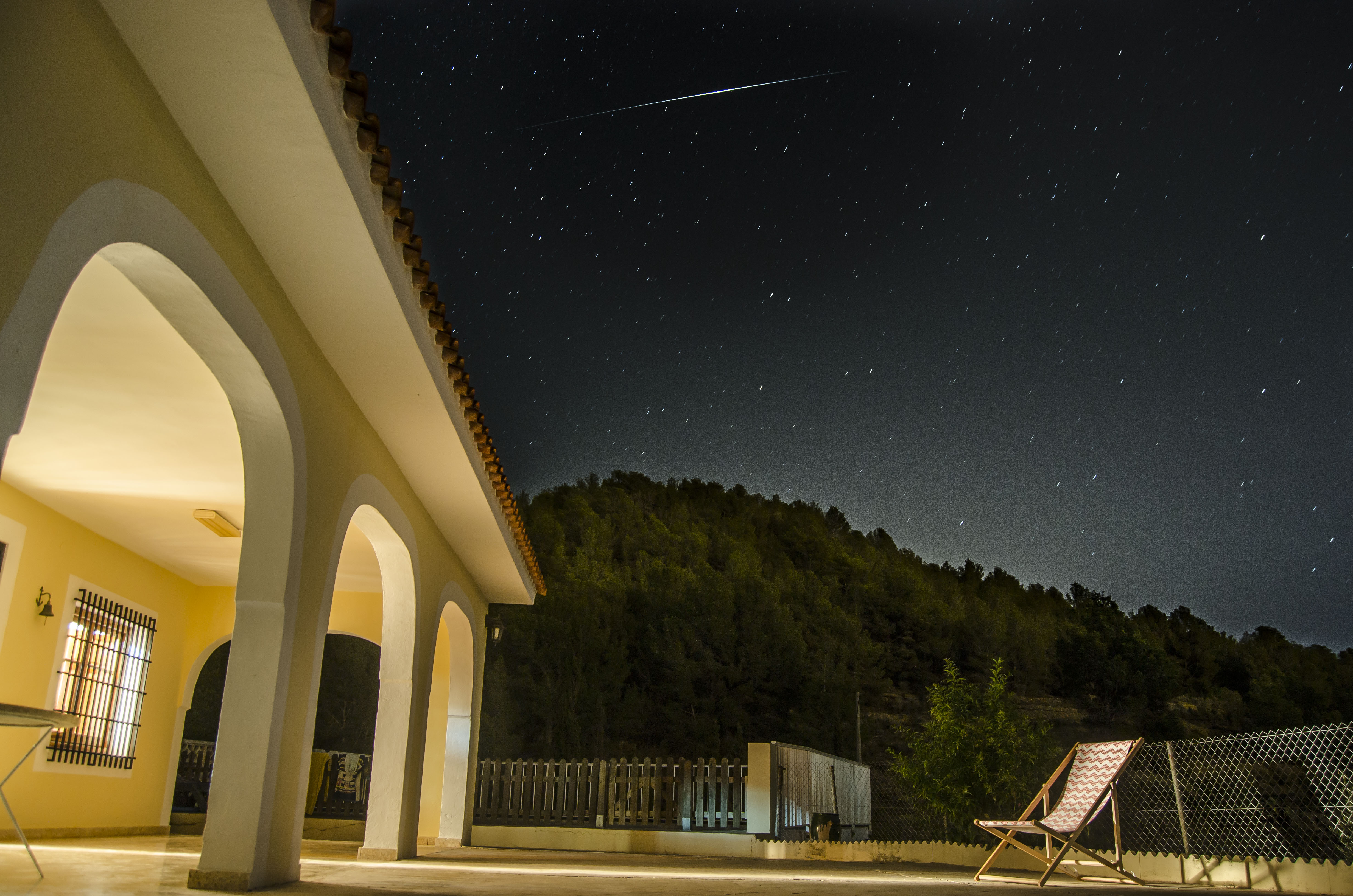 Fotografia d'un satèl·lit d'Iridium vist des de la Terra el 24/07/2016 a les 23:42. 50 segons d'exposició, ISO 160, f/5.6